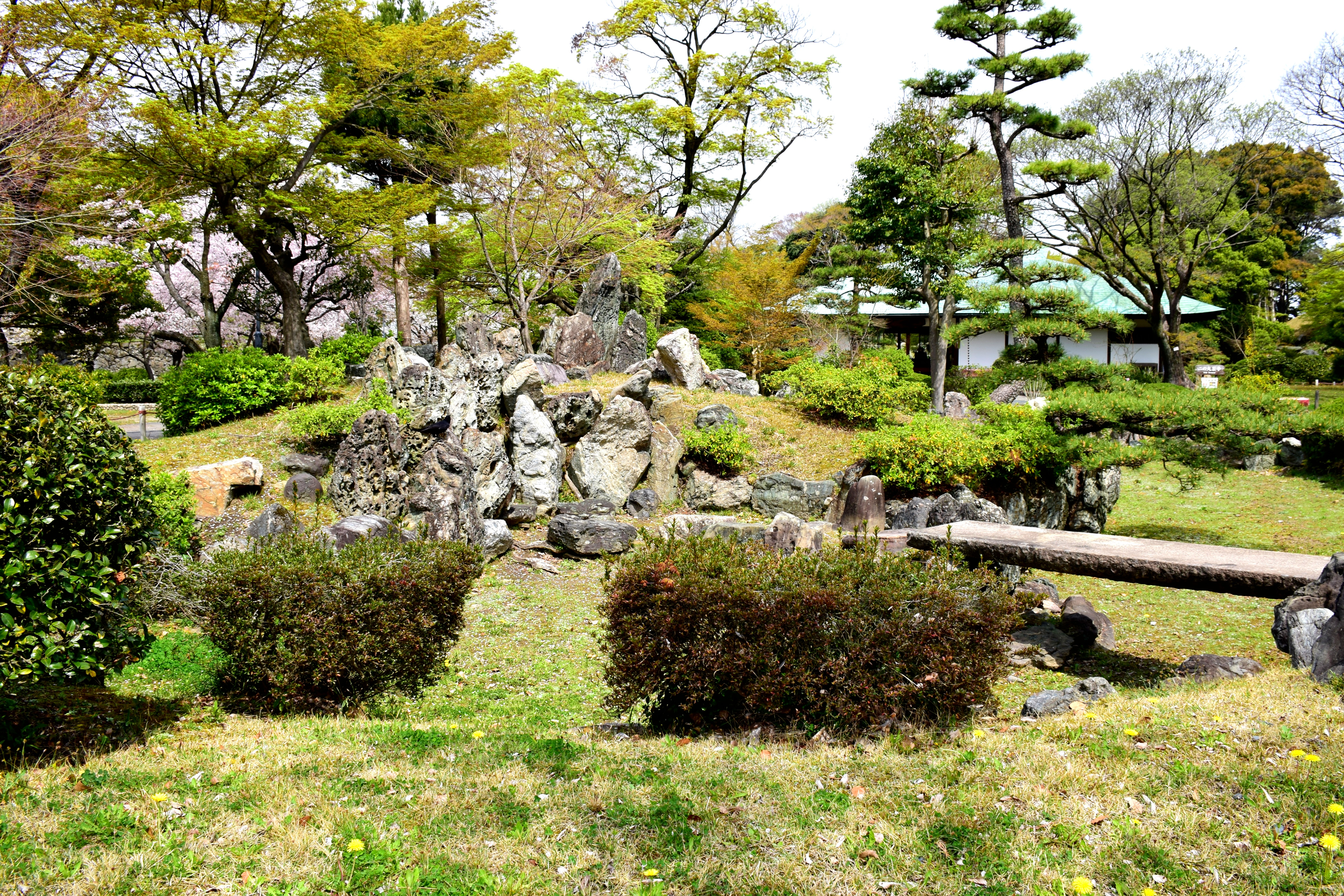 名古屋城二の丸庭園